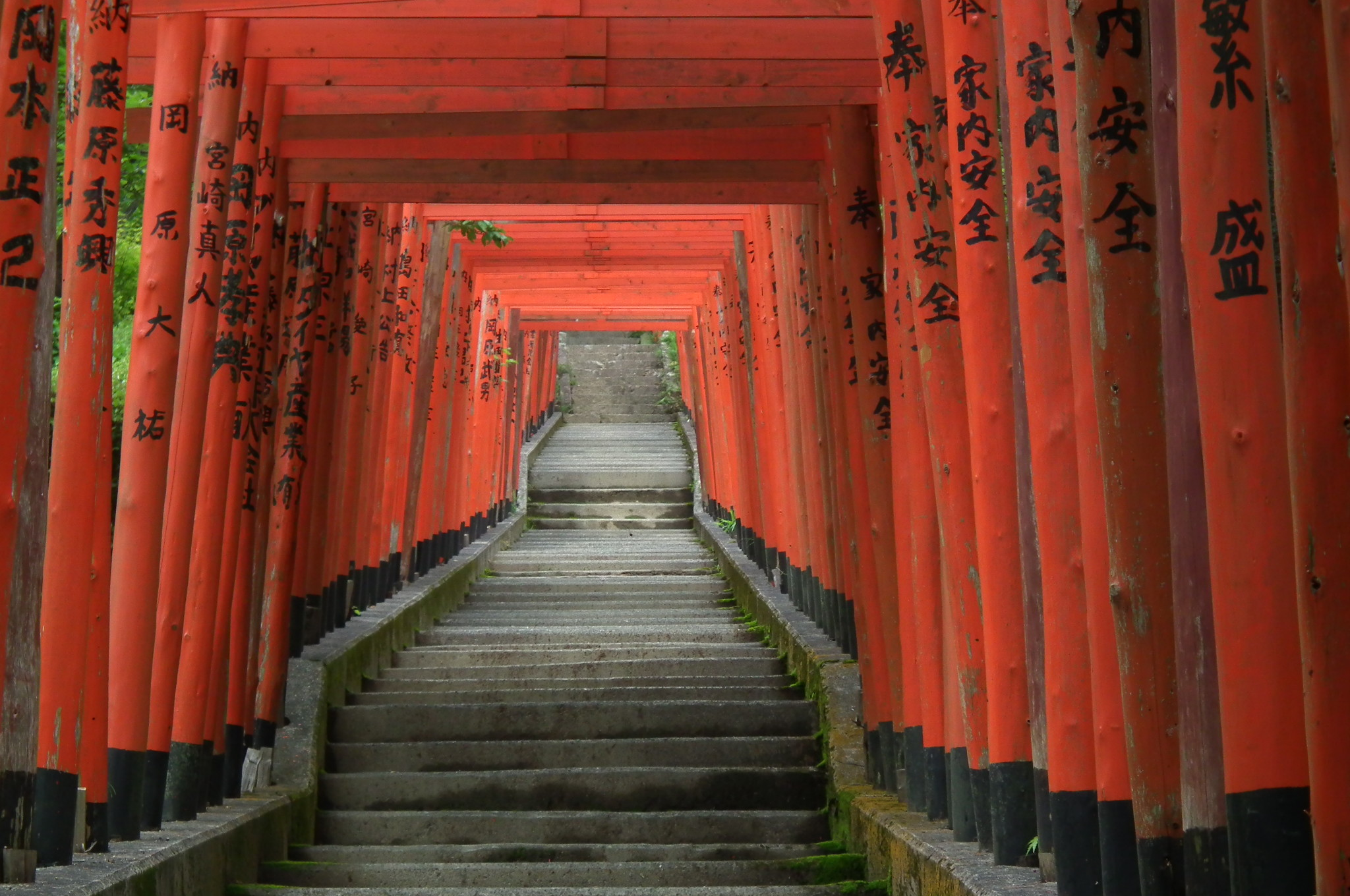 Oka-Inari 岡稲荷神社 鳥居